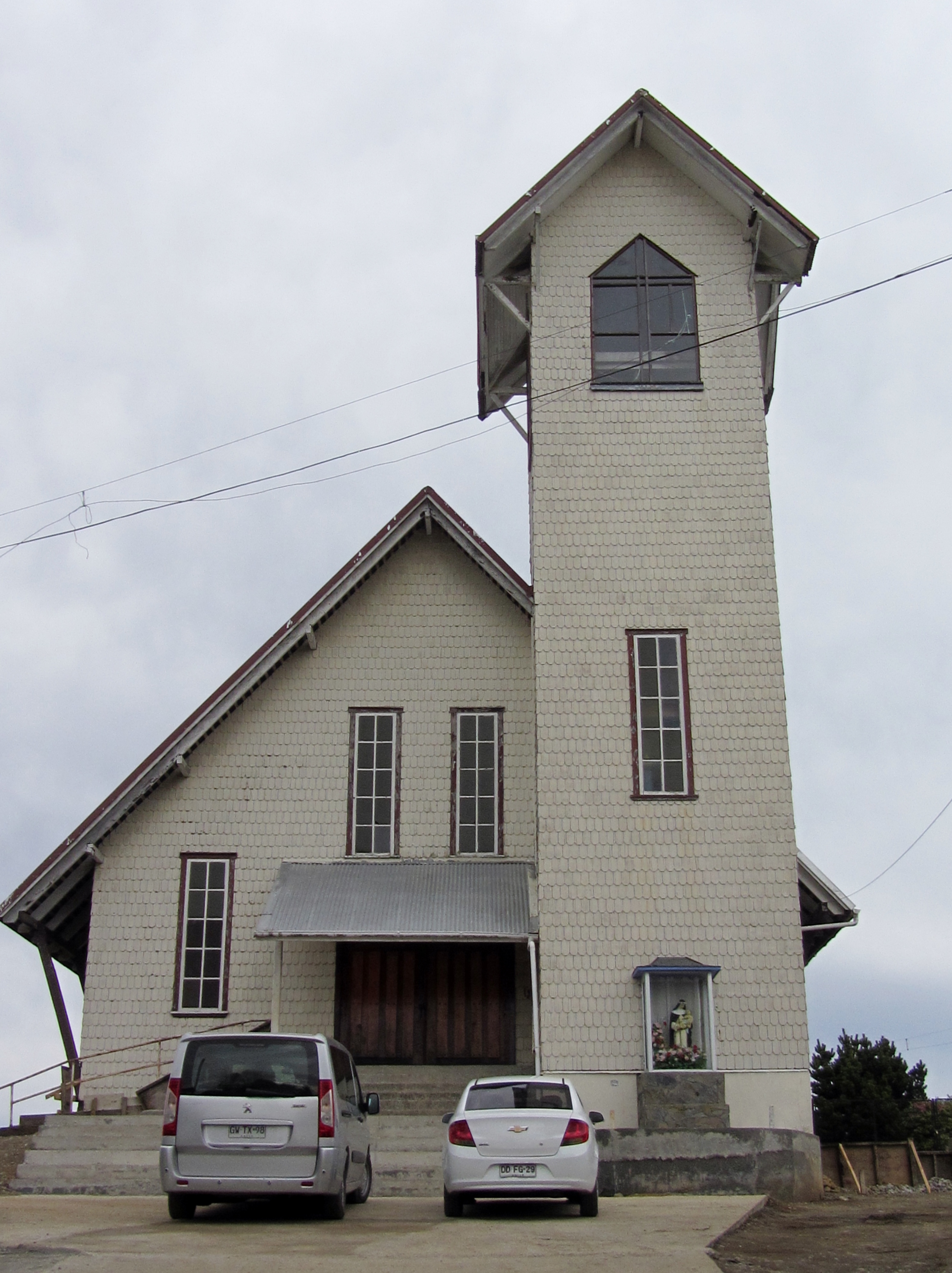 La iglesia parroquial Santa Rosa de Lima, Nueva Braunau, Chile.